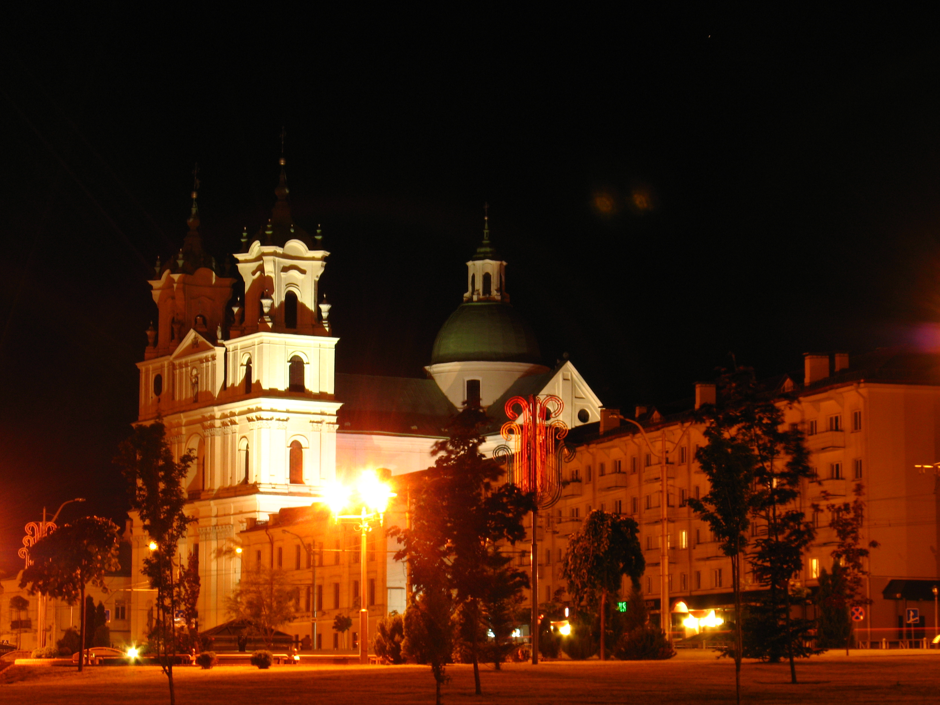 Беларуская (тарашкевіца): Ансамбль былога кляштара езуітаў:касьцёлдэкаратыўнае аздабленьне інтэр’ера касьцёла: галоўны алтар, 12 алтароў, амбон, 16 фрэскавых кампазіцый, фрэскі на парусах, росьпісы на падпружных арках, помнік на магіле А. Тызэнгаўза, арган, лаваў прэсбітэрыі, расьпісаная на тэмы жыційных сюжэтаў, два таршэры ў прэсбітэрыі, дзьве спавядальніжылыя карпусыаптэкаагароджа. г. Горадня This is a photo of Belarusian heritage monument. Reference number: 412Г000028 ( WLM)